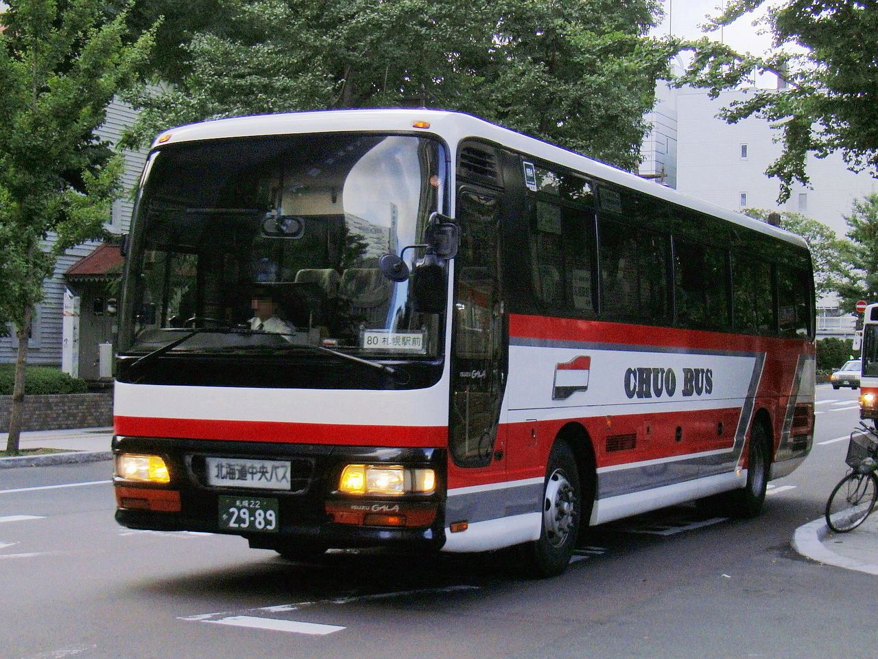 Sapporo city line